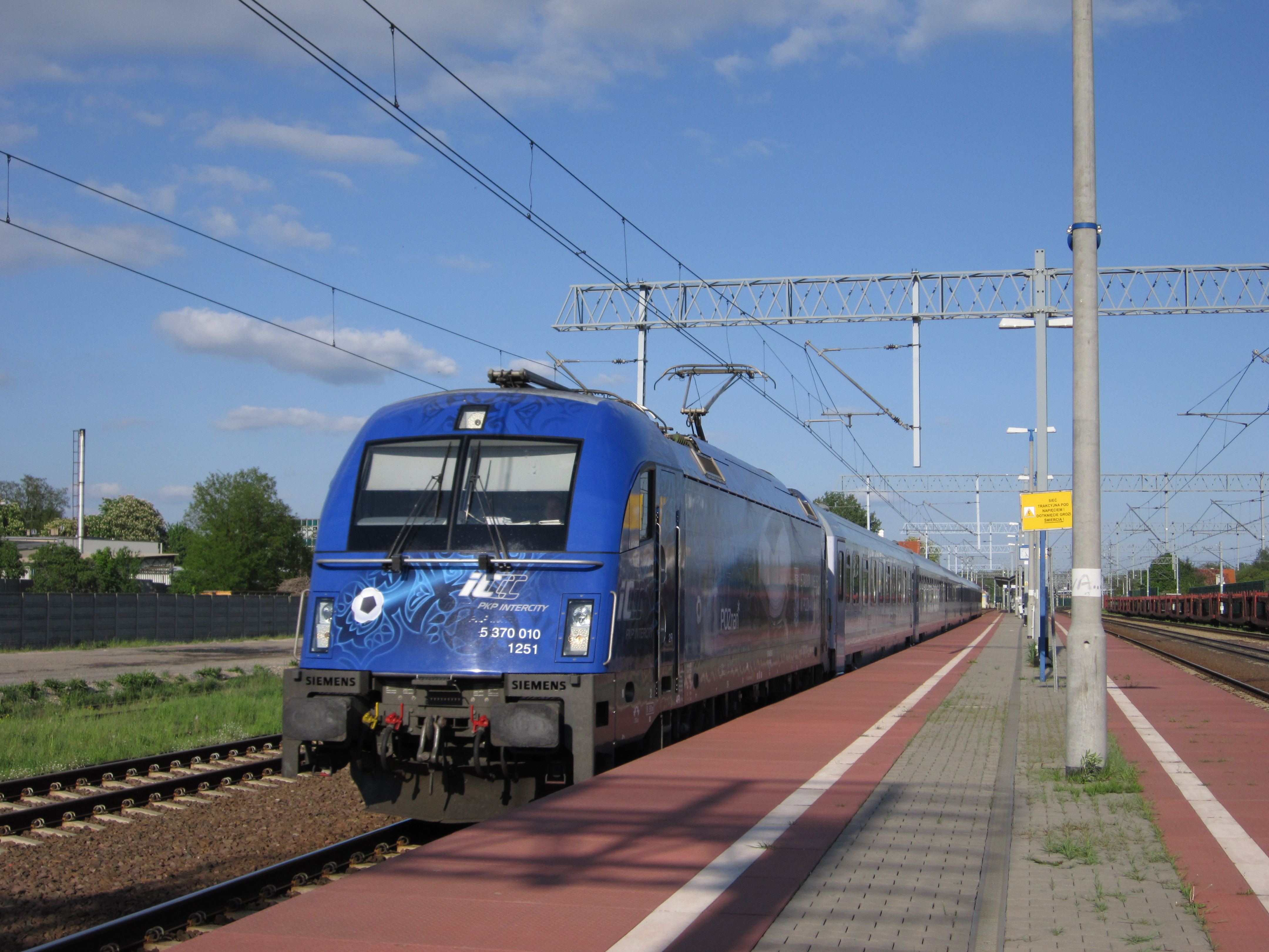 Lokomotywa EU44 oklejona w barwy stadionu miejskiego w Poznaniu na czas trwania EURO 2012.